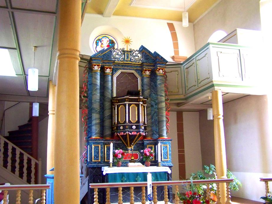 der Altar der Ober-Mockstädter (Ortsteil von Ranstadt) Pfarrkirche